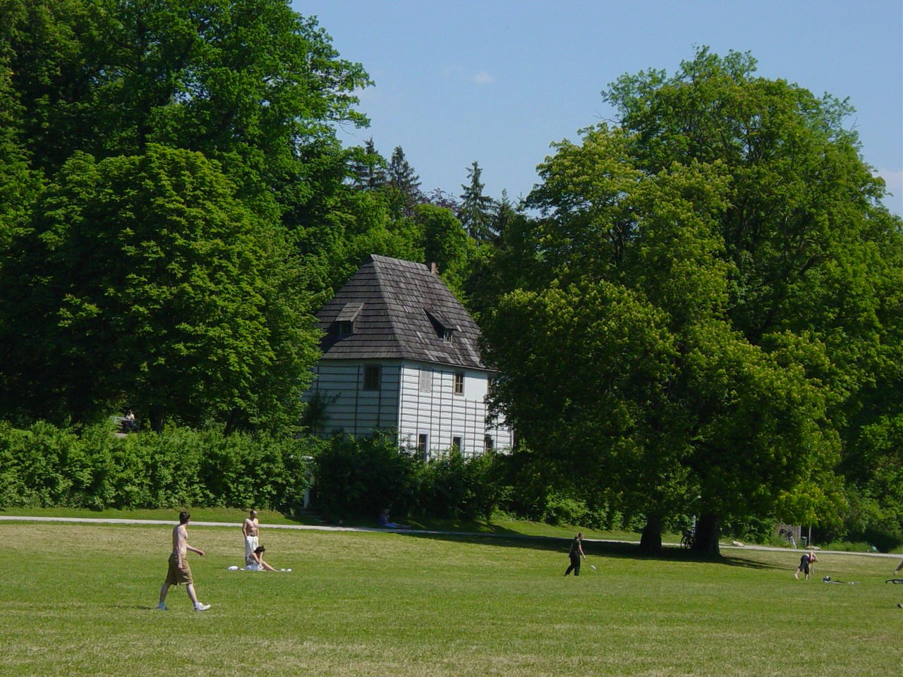 Goethes Gartenhaus in Weimar